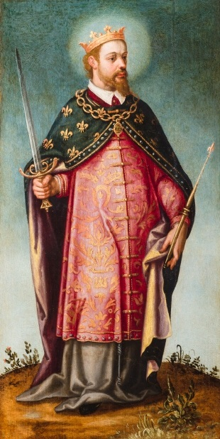 La obra representa a San Luis (1214-1270), rey de Francia desde 1226 hasta su muerte y canonizado en 1297.